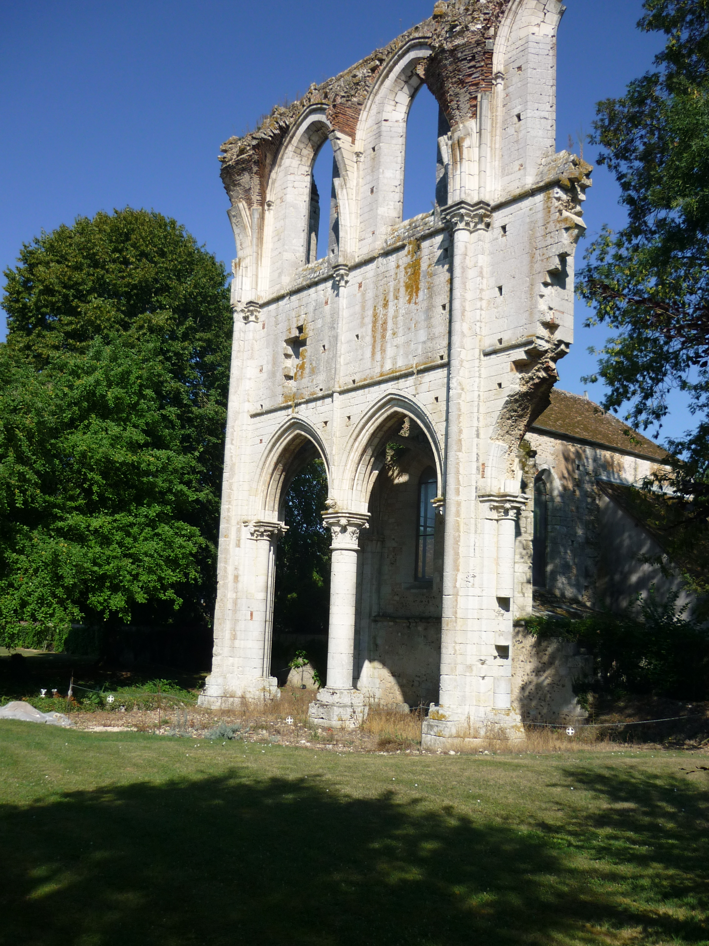 Klosterruine Fontainejean